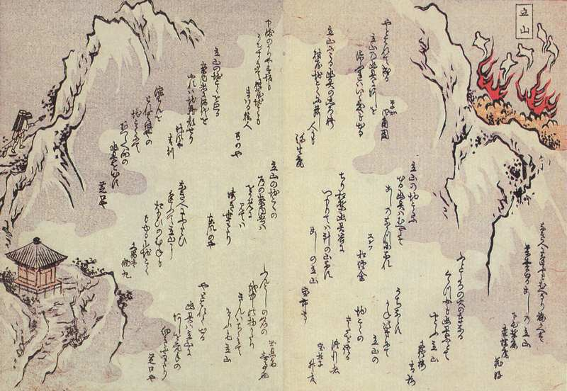 Tateyama (立山, Mount Tate) from the Kyōka Hyaku Monogatari (狂歌百物語)